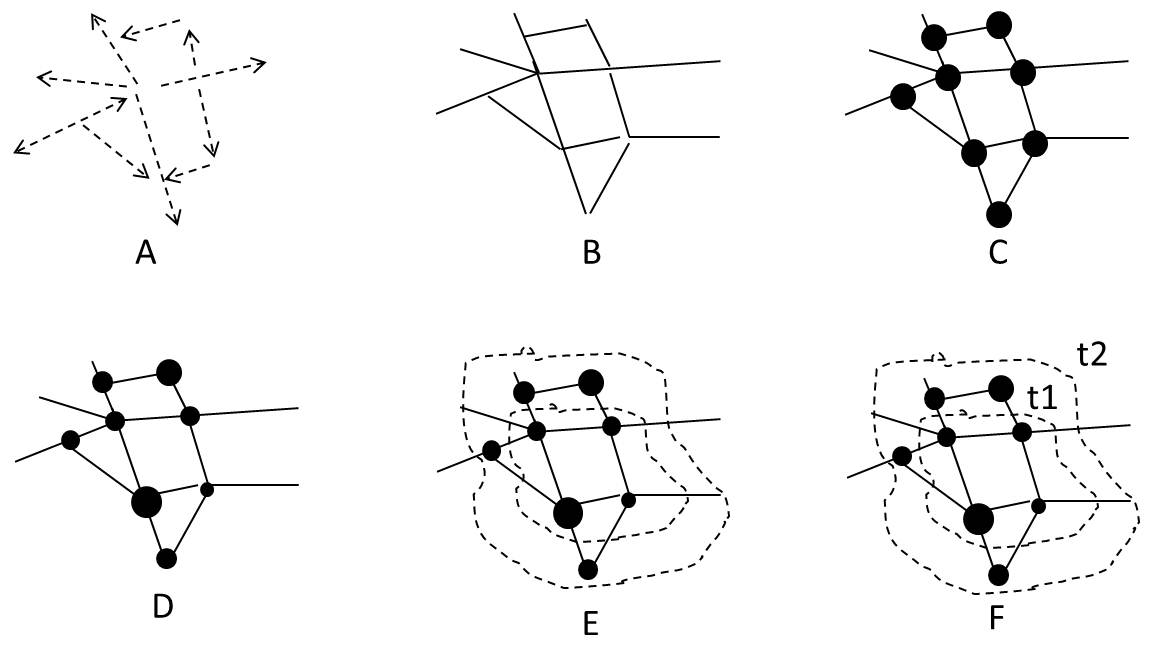 Sistema espacial como un conjunto de: A) Flujos, B) Canales, C) Nodos, D) Jerarquías, E) Superficies y F) Difusiones